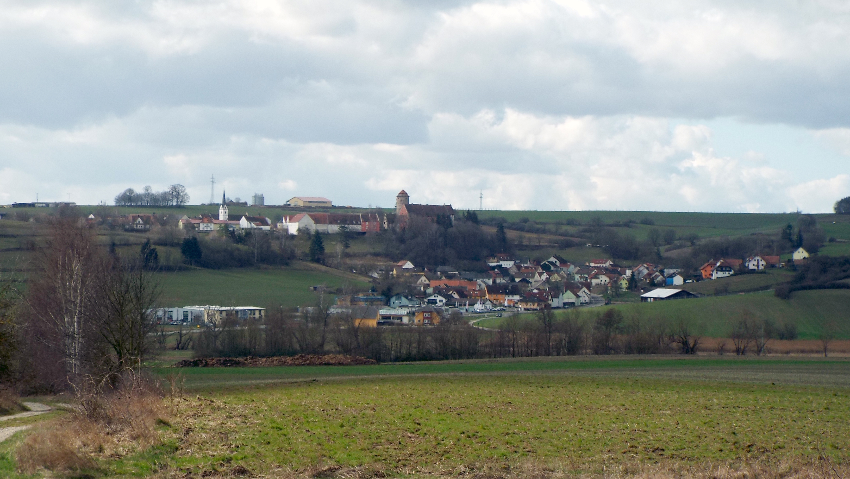 Lisberg ist eine Gemeinde im oberfränkischen Landkreis Bamberg und ein Mitglied der Verwaltungsgemeinschaft Lisberg. Die Gemeinde liegt im Steigerwald.